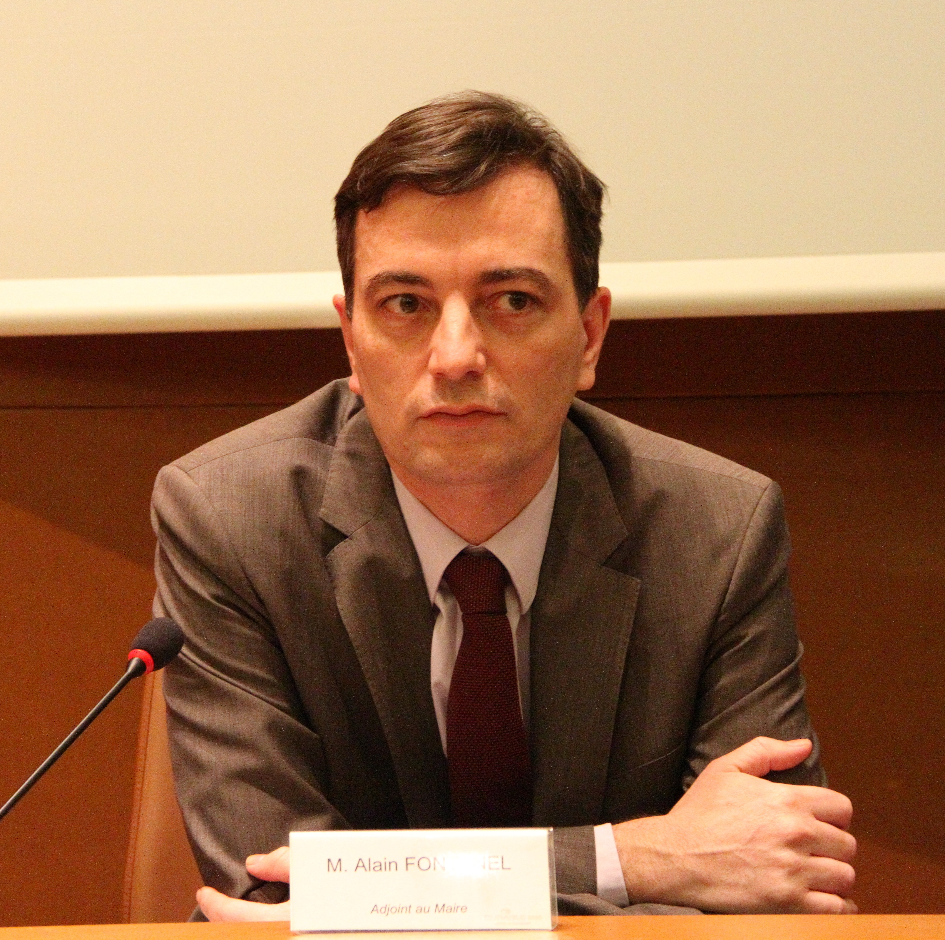 Alain Fontanel, adjoint au maire de Strasbourg